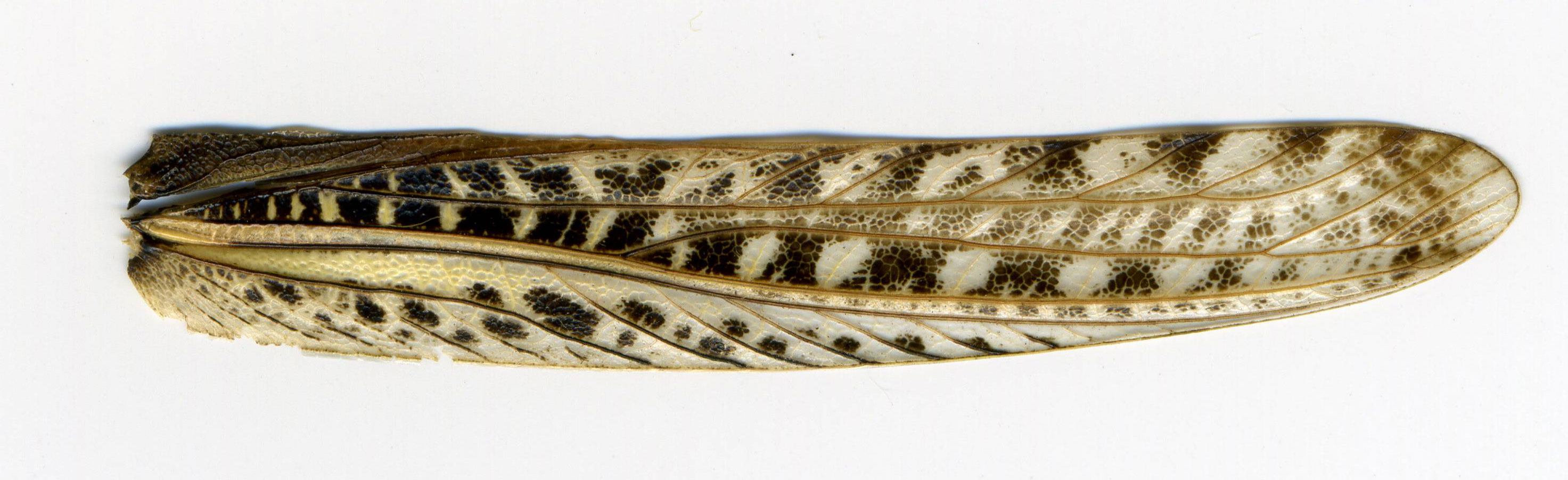 Крыло насекомого. Найдено в Ласпинской бухте